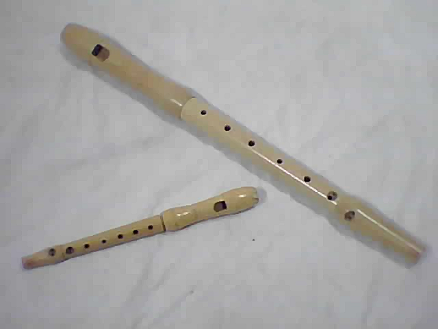 Flutes